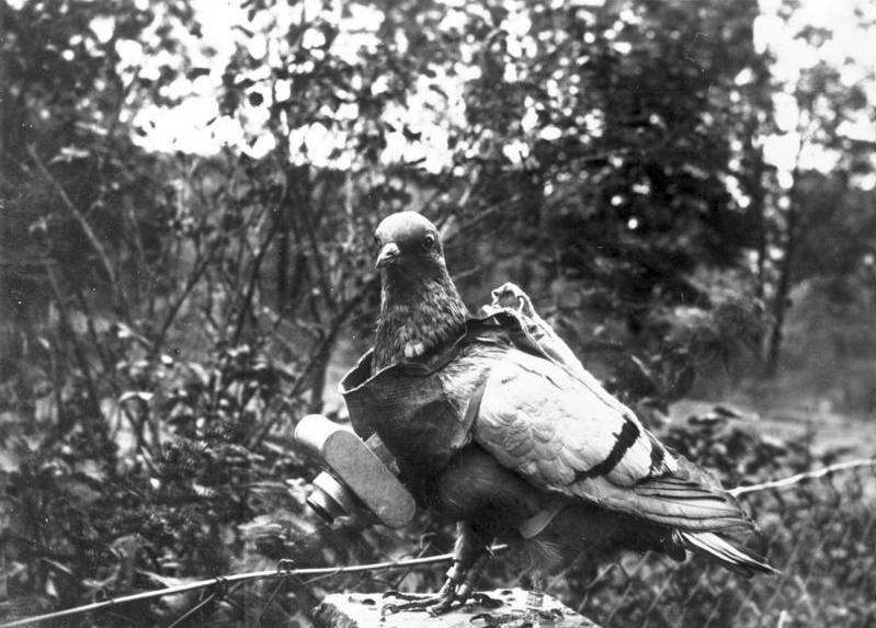 Brieftaube mit Fotokamera Zentralbild Brieftaubenfotografie, Fotografie mit Hilfe eines kleinen fotografischen Apparates, der an einem der Taube umgehängten Brustschild befestigt wird. Der Verschluß des Apparates läßt sich so einstellen, das die Aufnahmen während des Fluges zu vorher bestimmten Zeiten erfolgen. [Vermutlich Luftaufklärung im Ersten Weltkrieg, ca. 1926 ins Scherl-Bildarchiv aufgenommen]